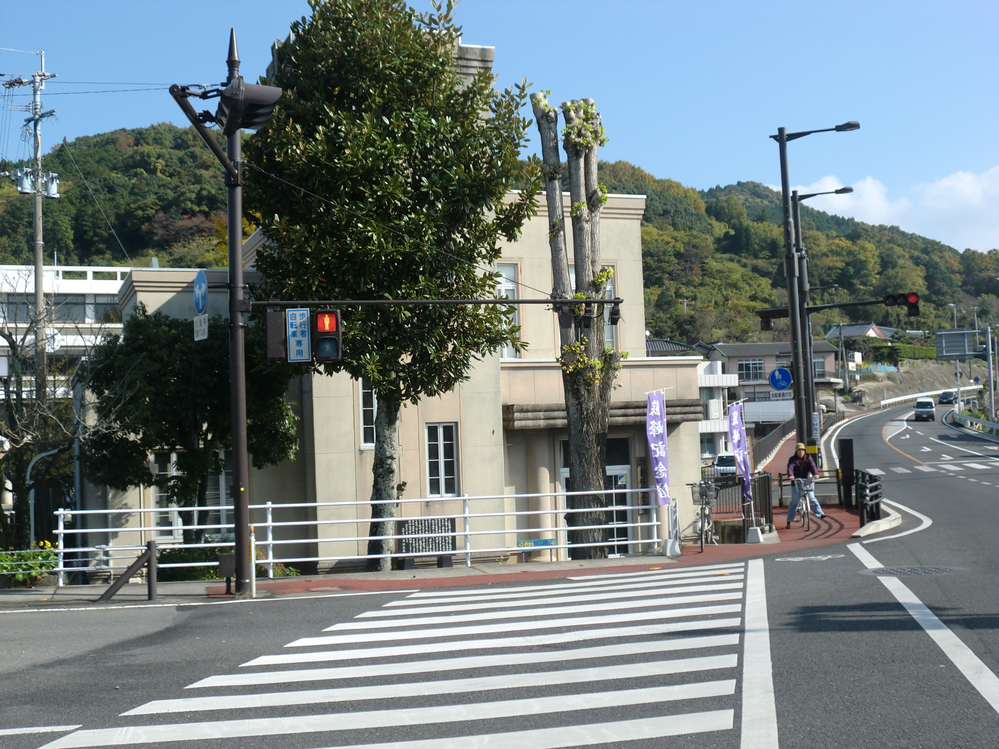 熊本県水俣市にある蘇峰（そほう）記念館。（旧・水俣市立図書館「淇水文庫」）